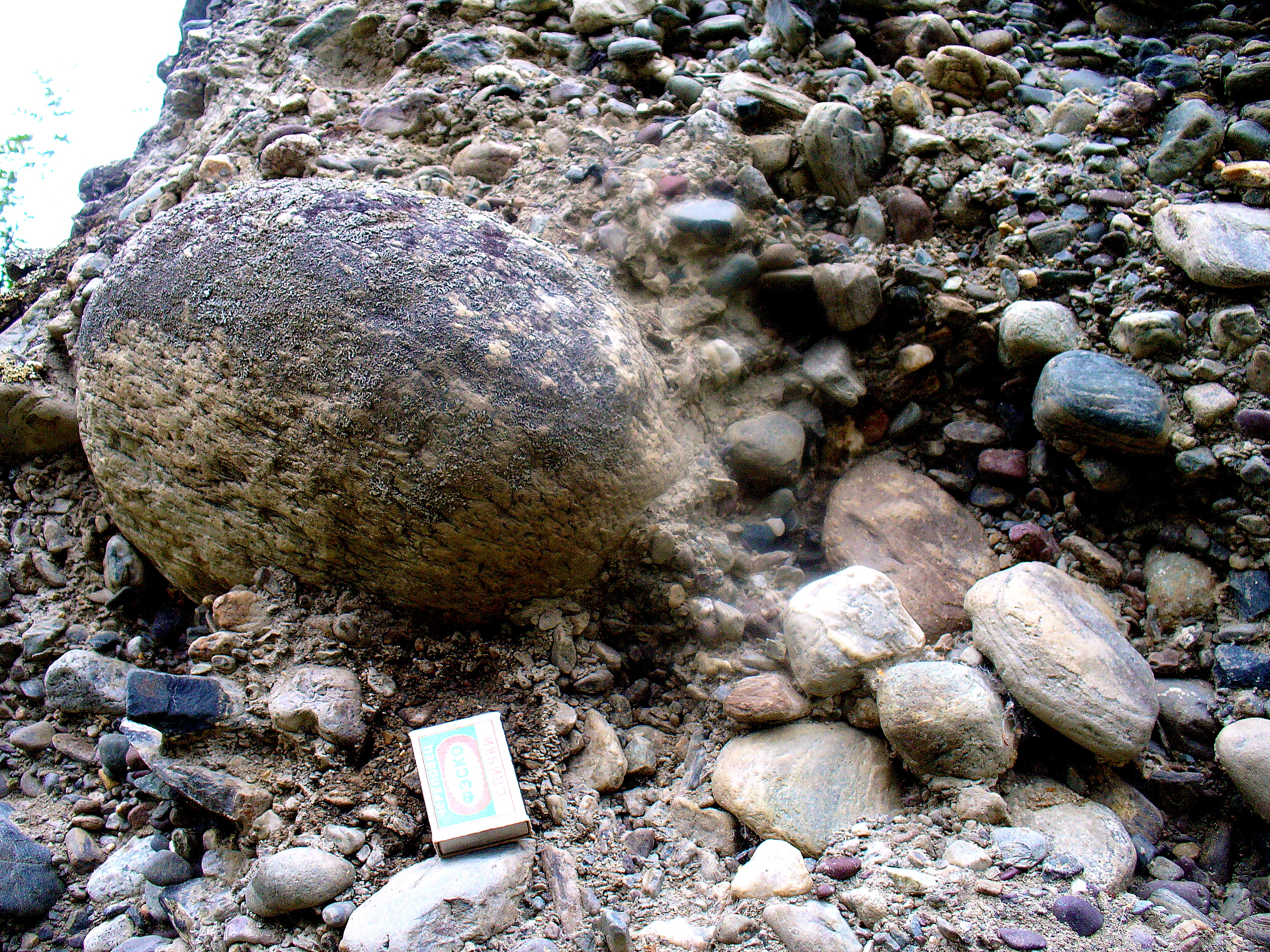 Характерная для пушинг-морен хаотичная сортировка средне- и хорошоокатанного материала. Горный Алтай, июль, 2010.